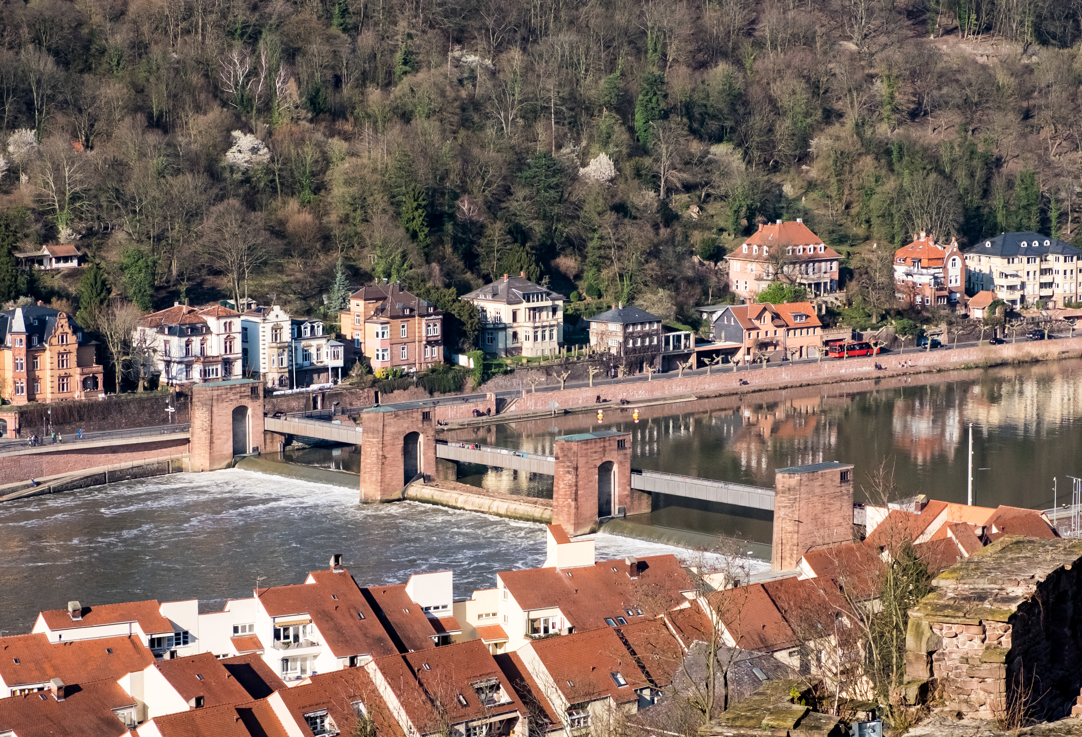 Neckar-Staustufe Heidelberg vom Schloß aus gesehen